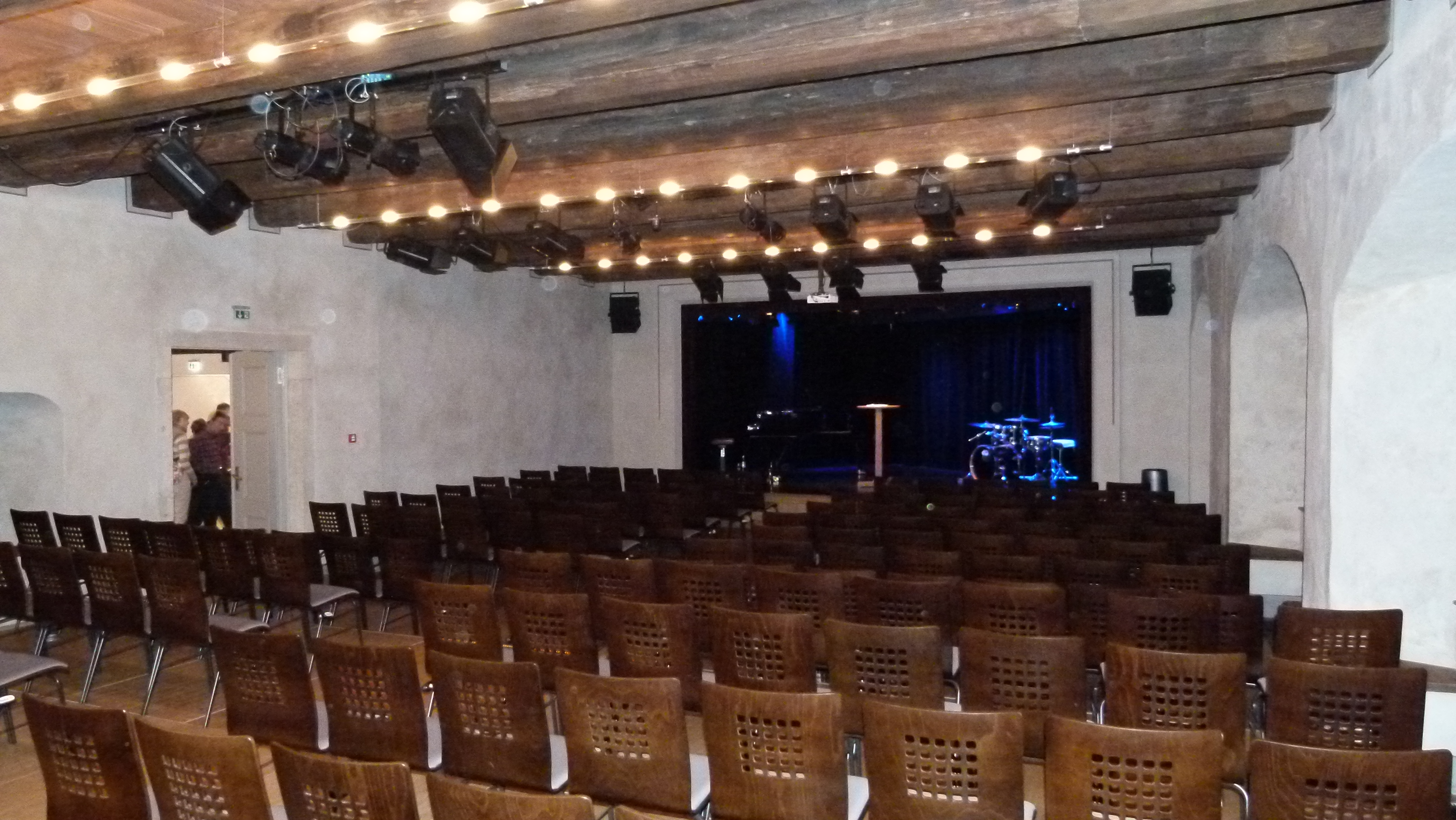 Innenansicht des Theatersaals, Peter-Ulrich-Haus, Am Markt 3, Pirna